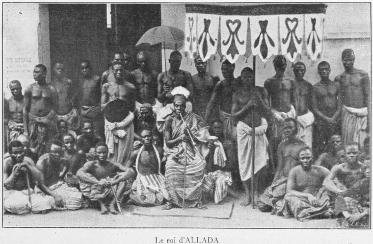 Le roi d'Allada